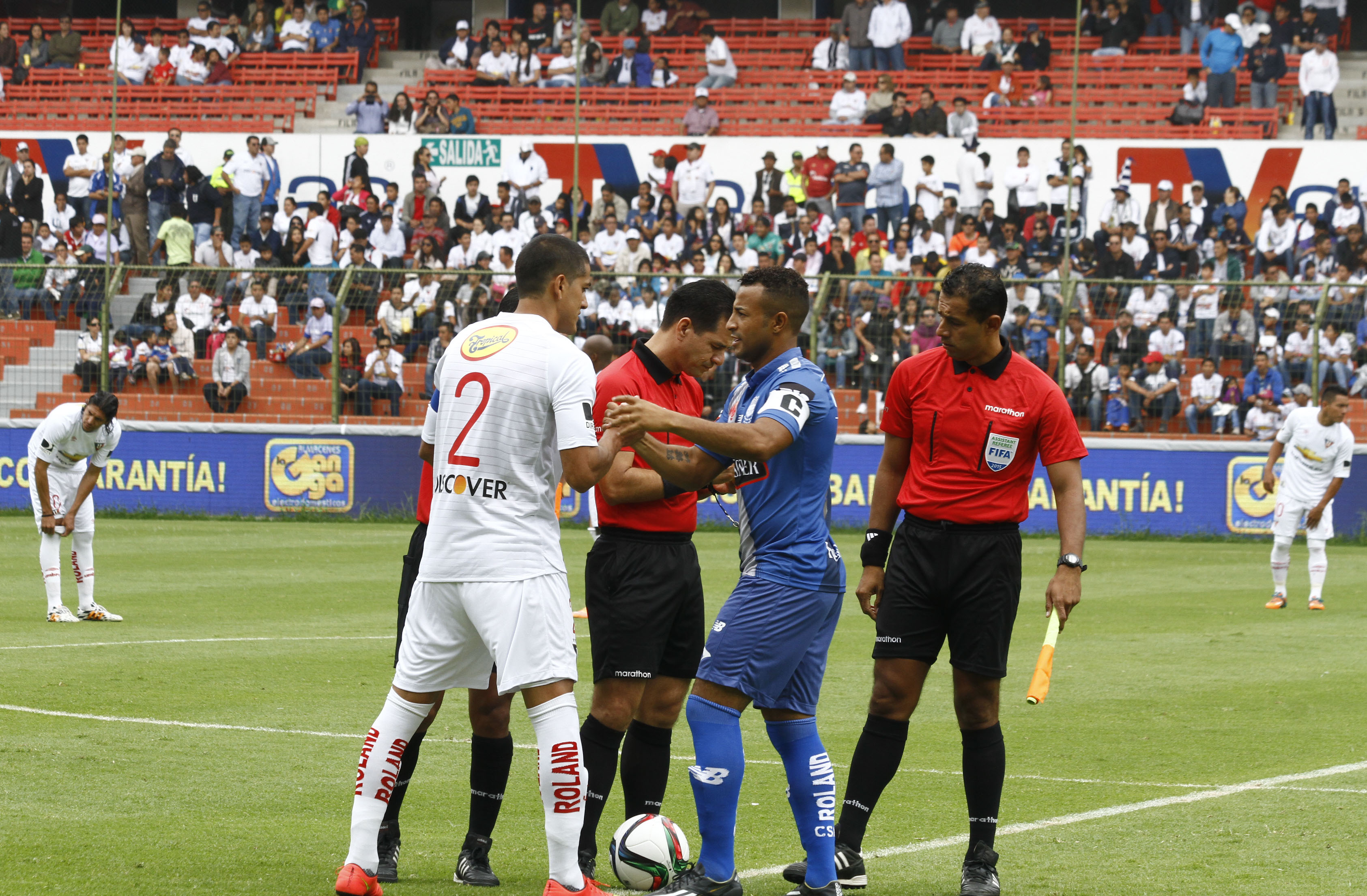 Quito, 28 feb (ANDES).- En el estadio Casa Blanca LDU de Quito venció por dos goles a uno al equipo eléctrico Emelec, en la quinta fecha del Campeonato Nacionaal de fútbol Copa Pilsener. Foto: Micaela Ayala V./ANDES